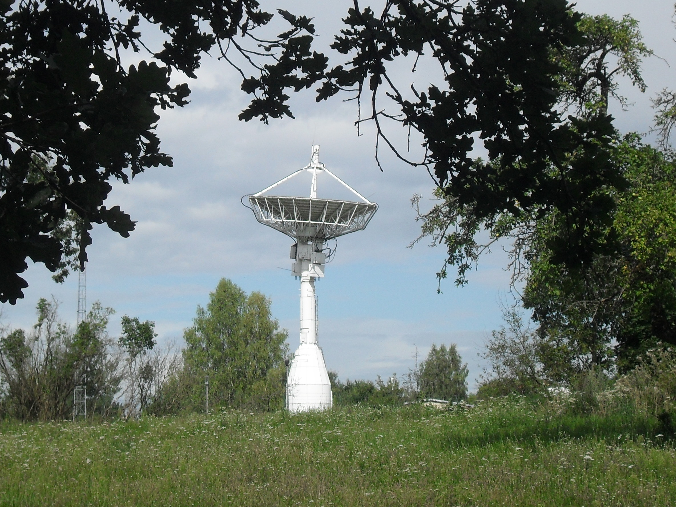 Satellitenantenne des Deutschen Zentrums für Luft- und Raumfahrt (DLR) am Standort Neustrelitz